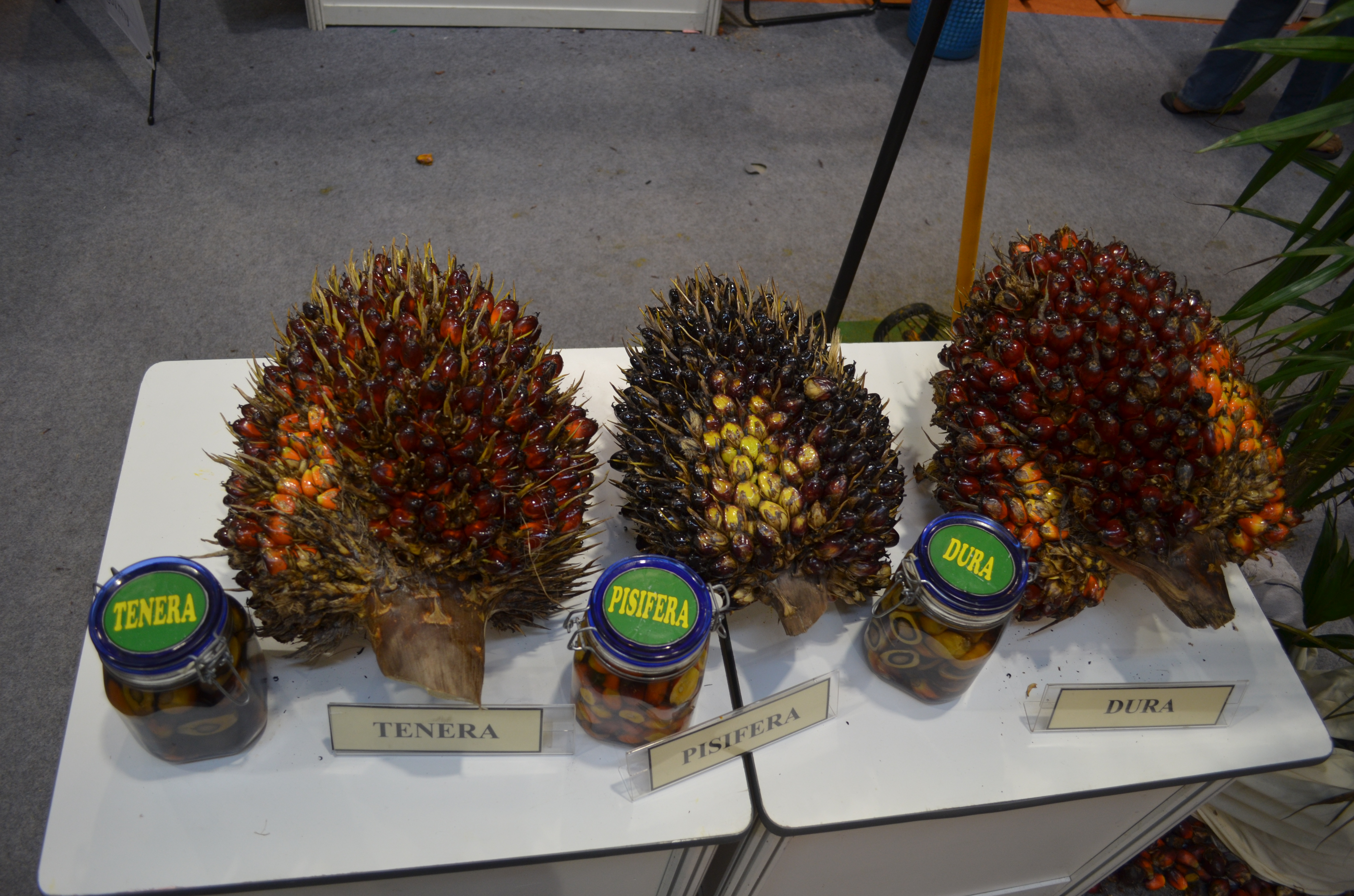 3 kultivar buah kelapa sawit iaitu Tenera, Pisifera dan Dura.